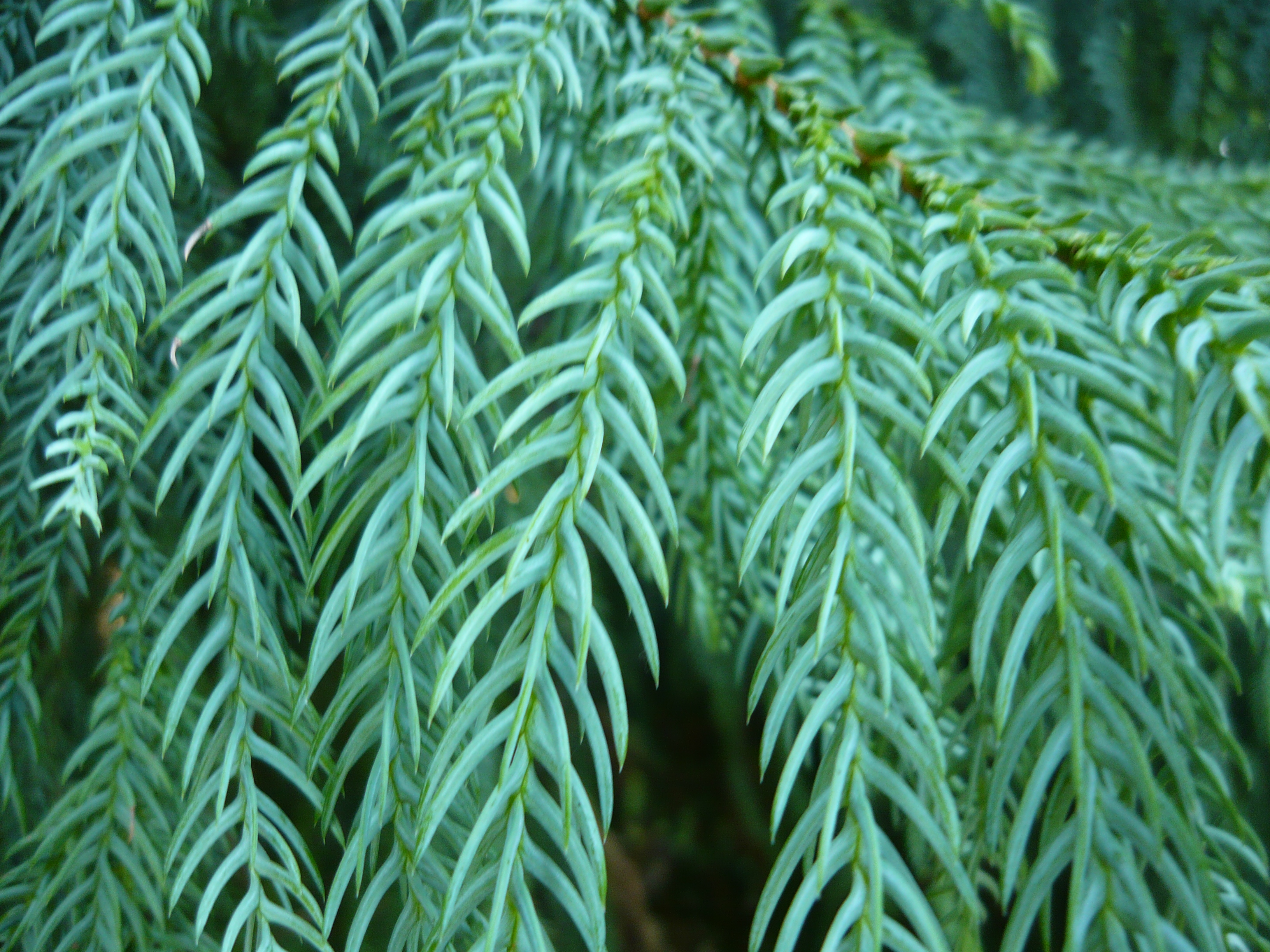 Taiwania cryptomerioides. Real Jardín Botánico de Madrid.